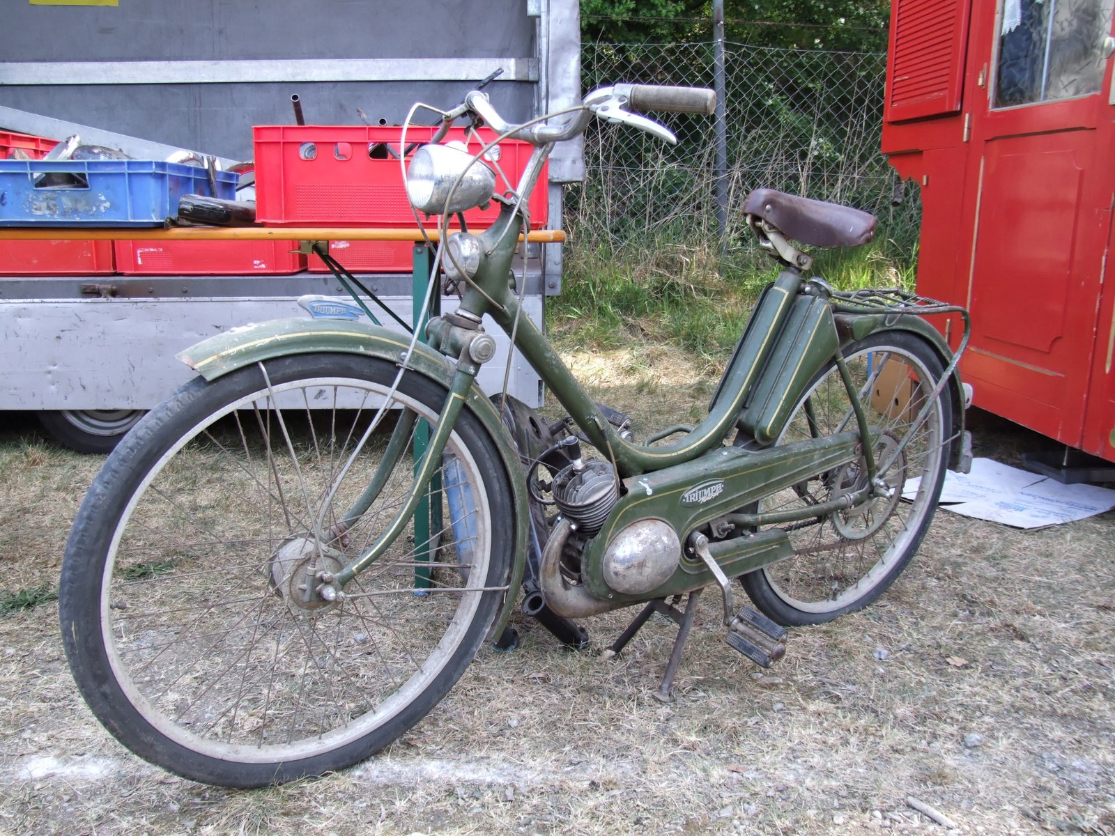 Quelle: selbst fotografiert, 04/2007 Fotograf: Späth Chr.